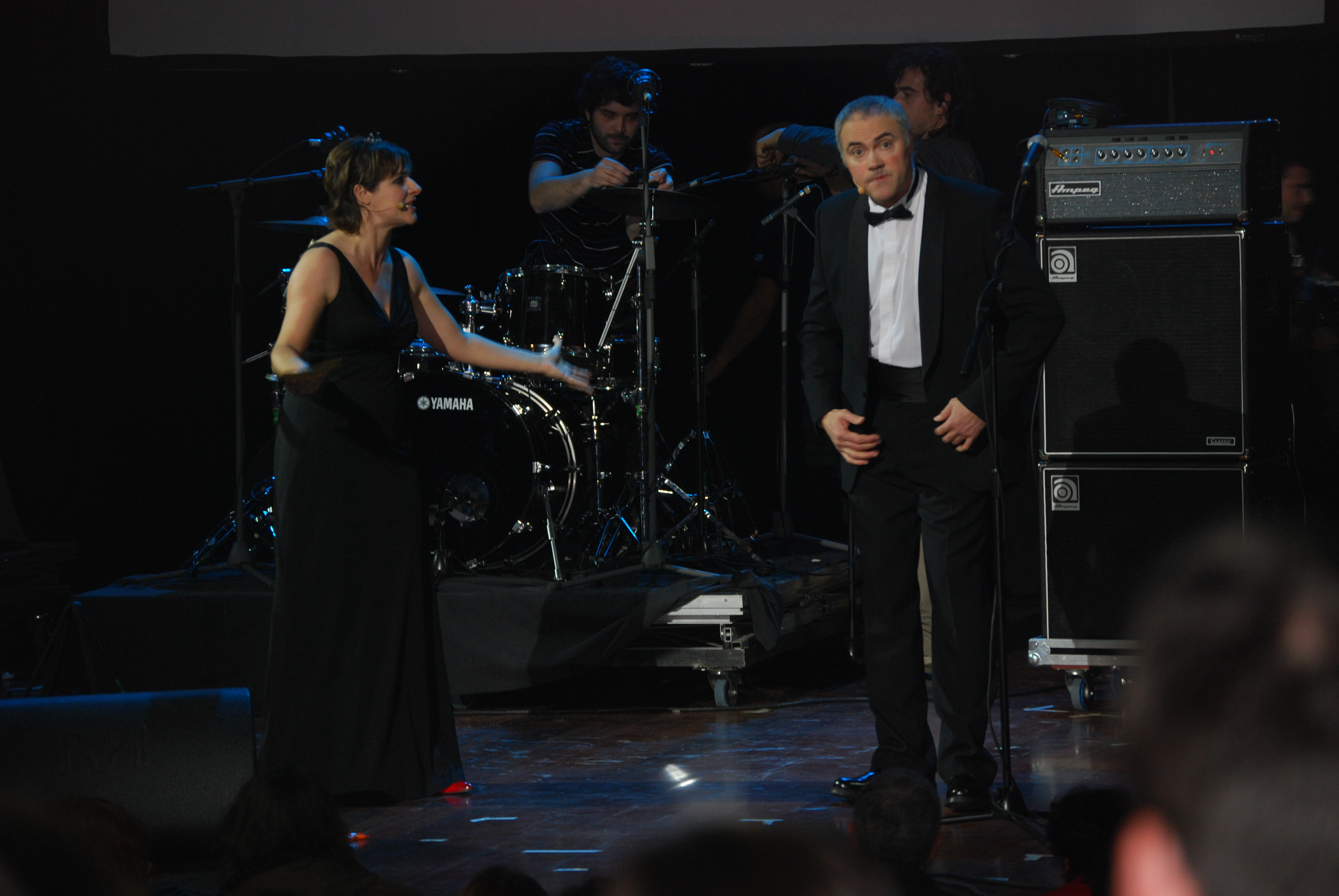 O grupo teatral Chévere presentando o Music.gal.